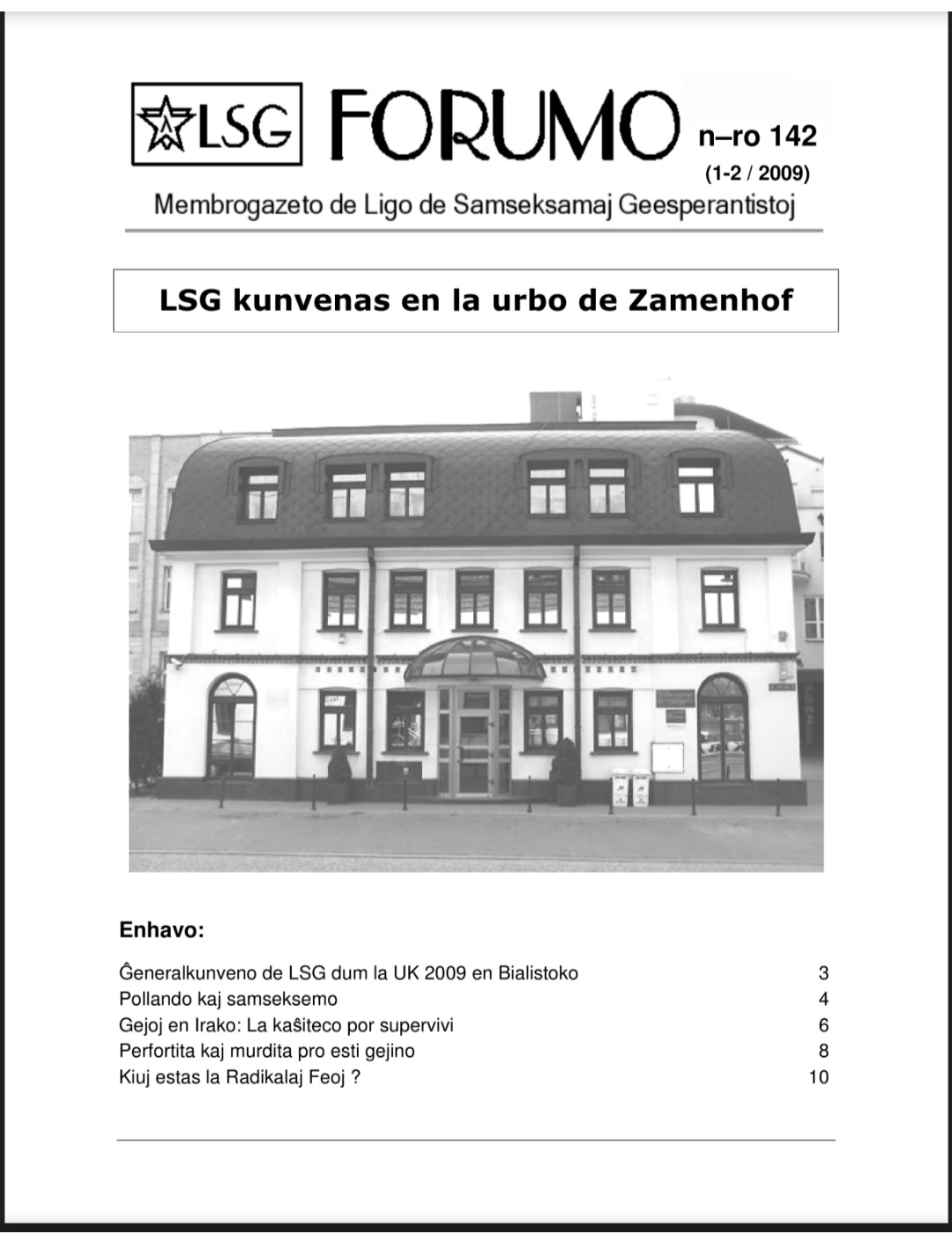 Forumo, oficiala organo de LSG ekde marto 1978